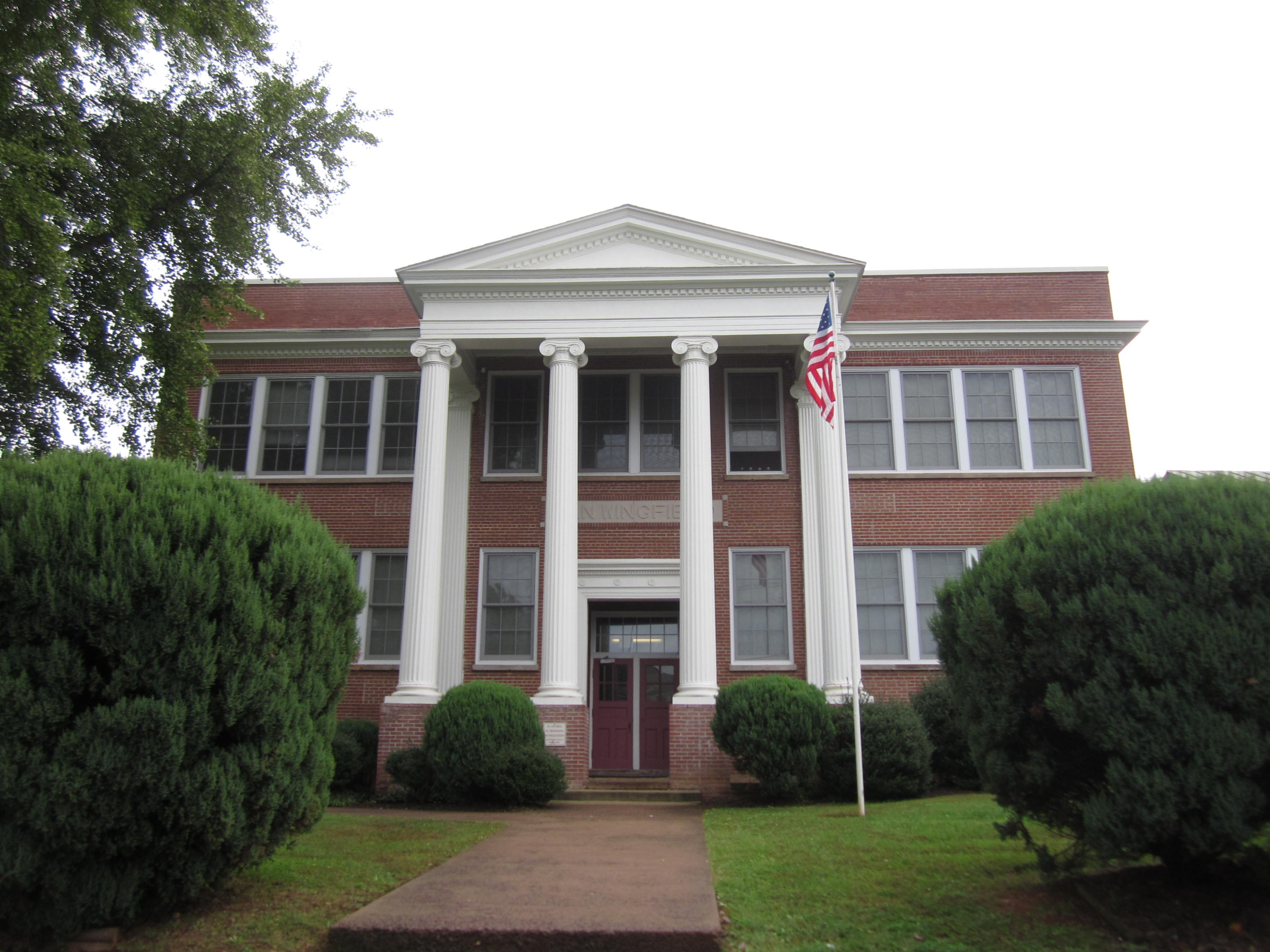 Culpeper, Virginia